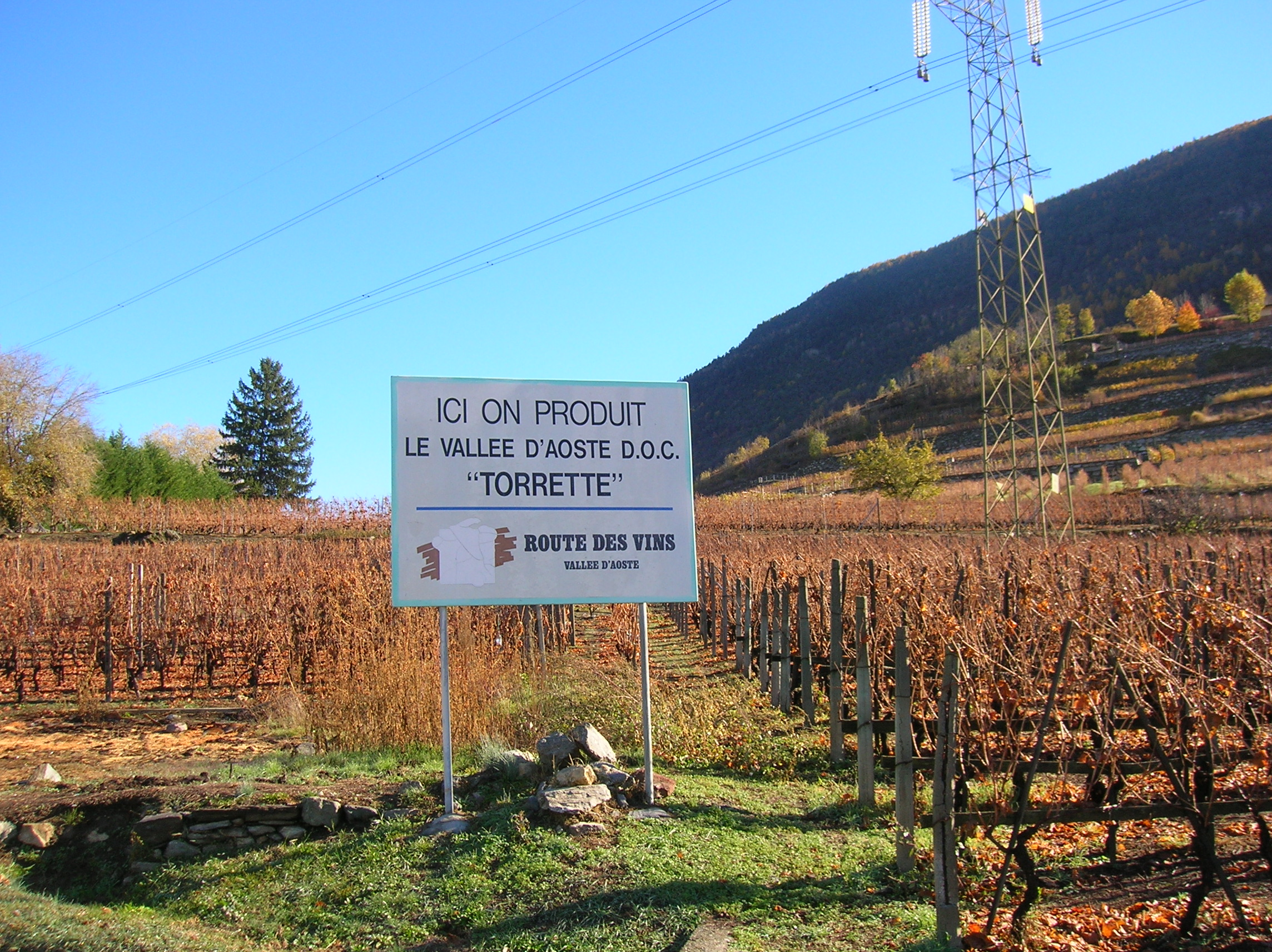 Zona di produzione del Valle d'Aosta Torrette. Foto scattata sulle colline di Aymavilles, Valle d'Aosta, Italia.